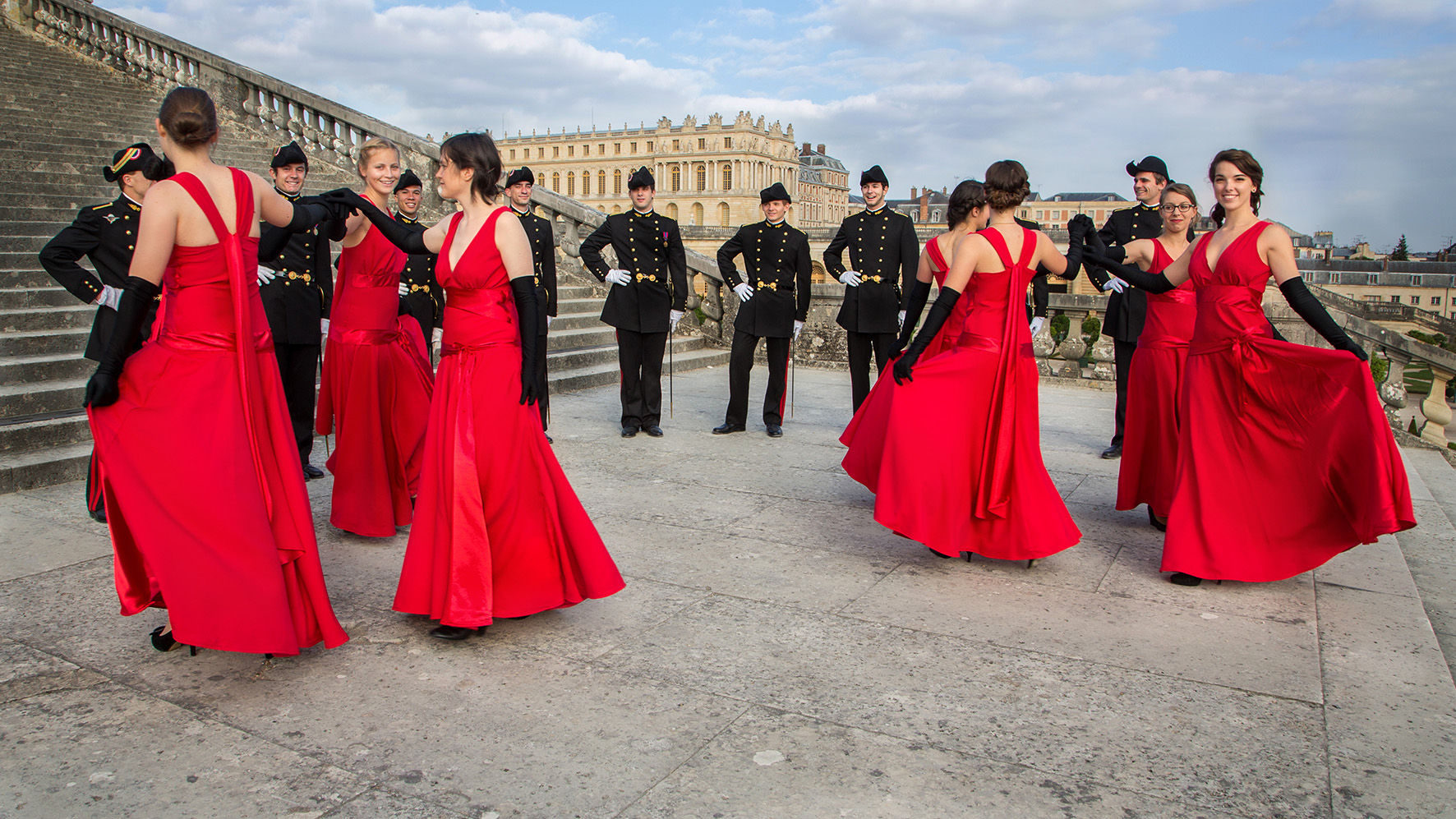 Répétition pour les danseurs et danseuses de quadrille au Château de Versailles (Bal de l'X 2015)